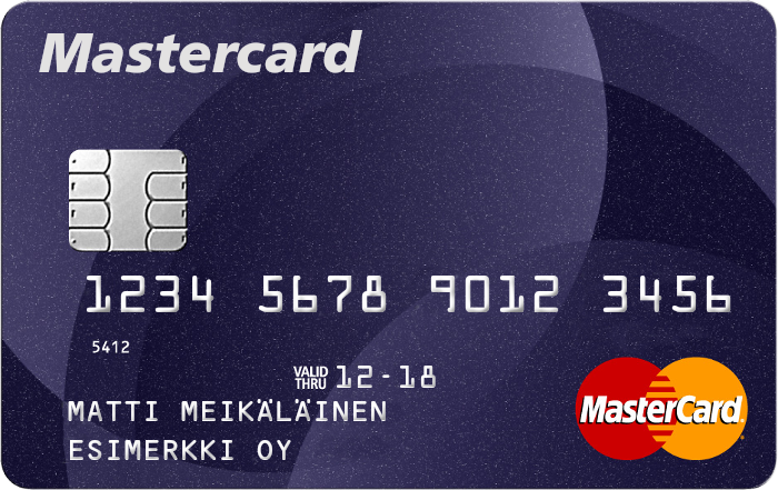 Maksukortti esimerkiksi